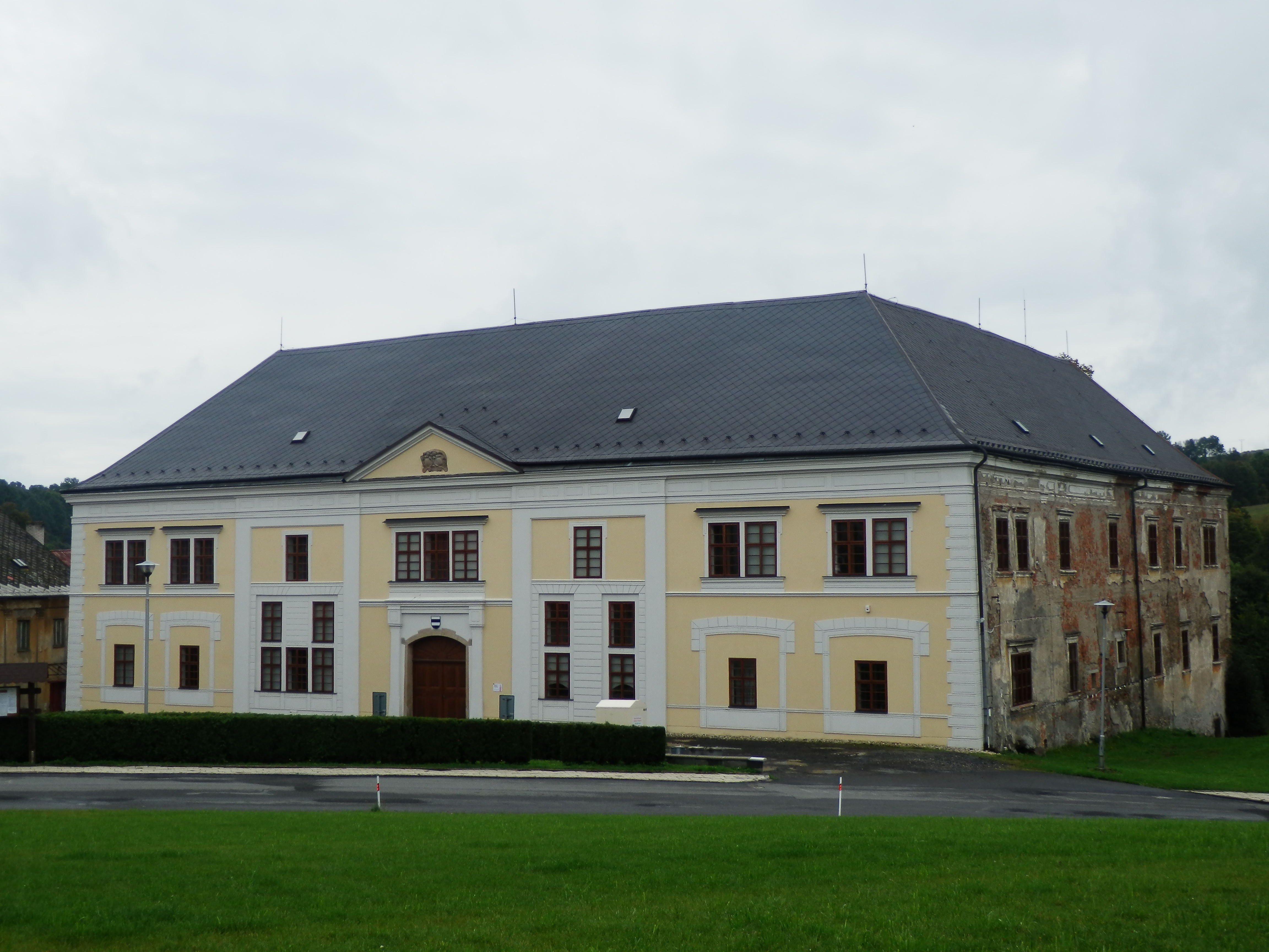 Zámek Potštát, Bočkovo náměstí 1, Potštát.